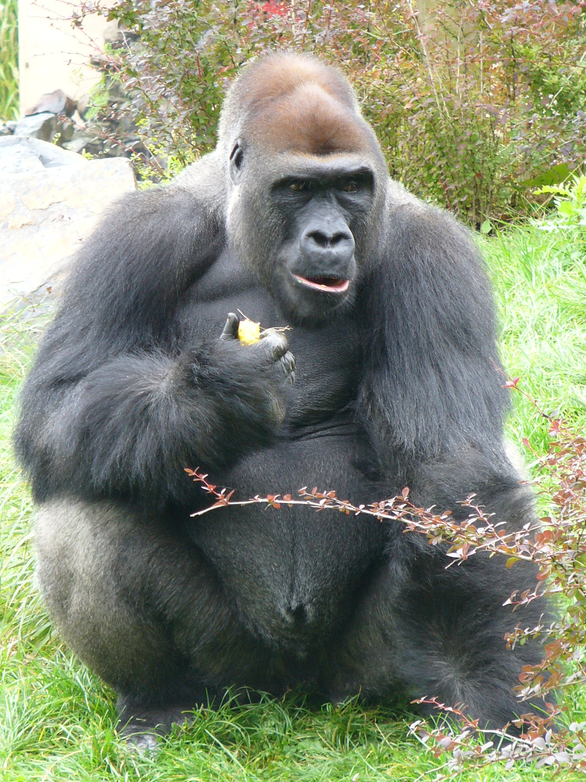 Goryl nizinny (Gorilla gorilla gorilla) w opolskim zoo. / Western Lowland Gorilla in Zoo Opole (Upper Silesia).